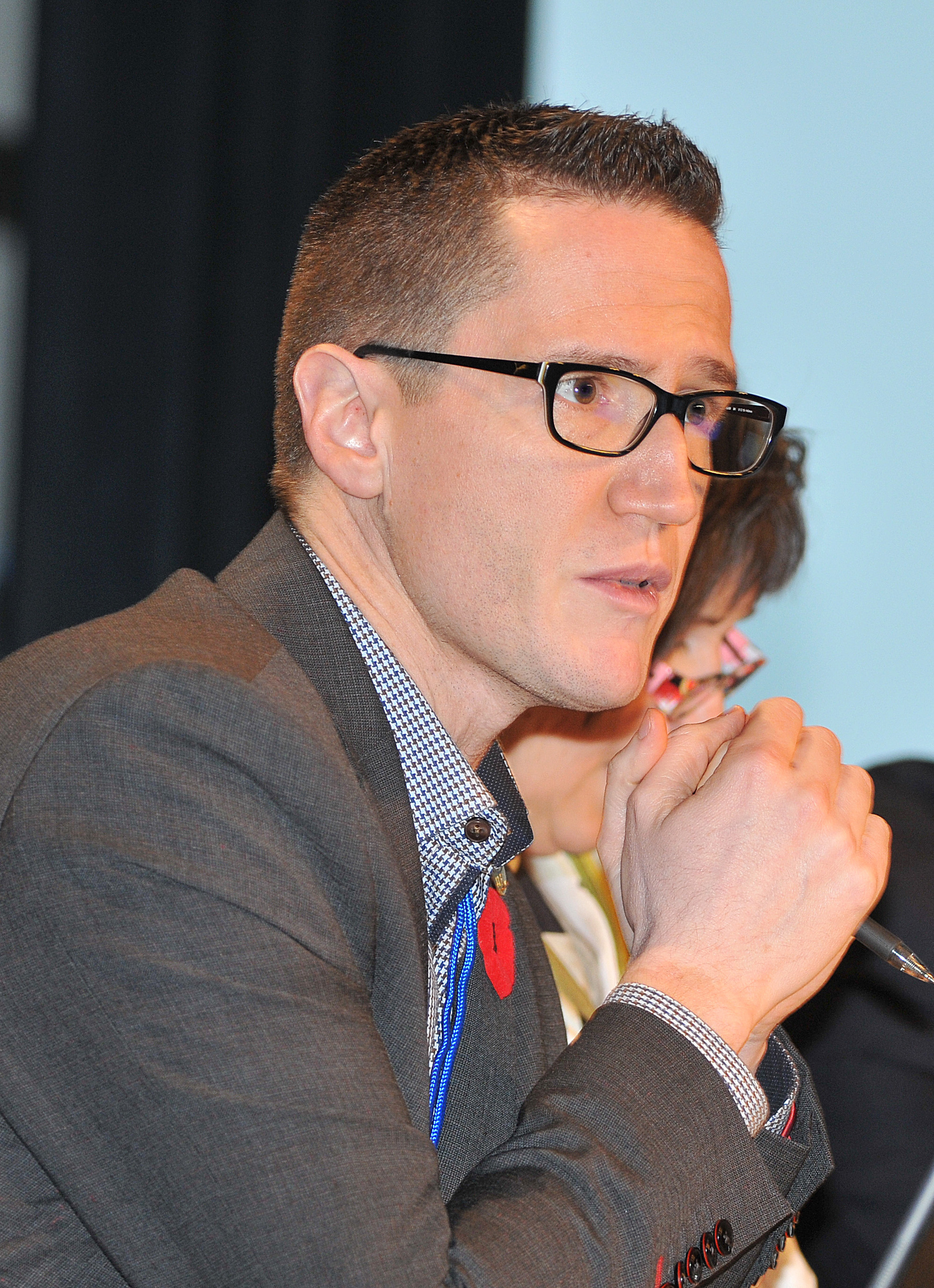 Benoit Charrette, député de Deux-Montagnes